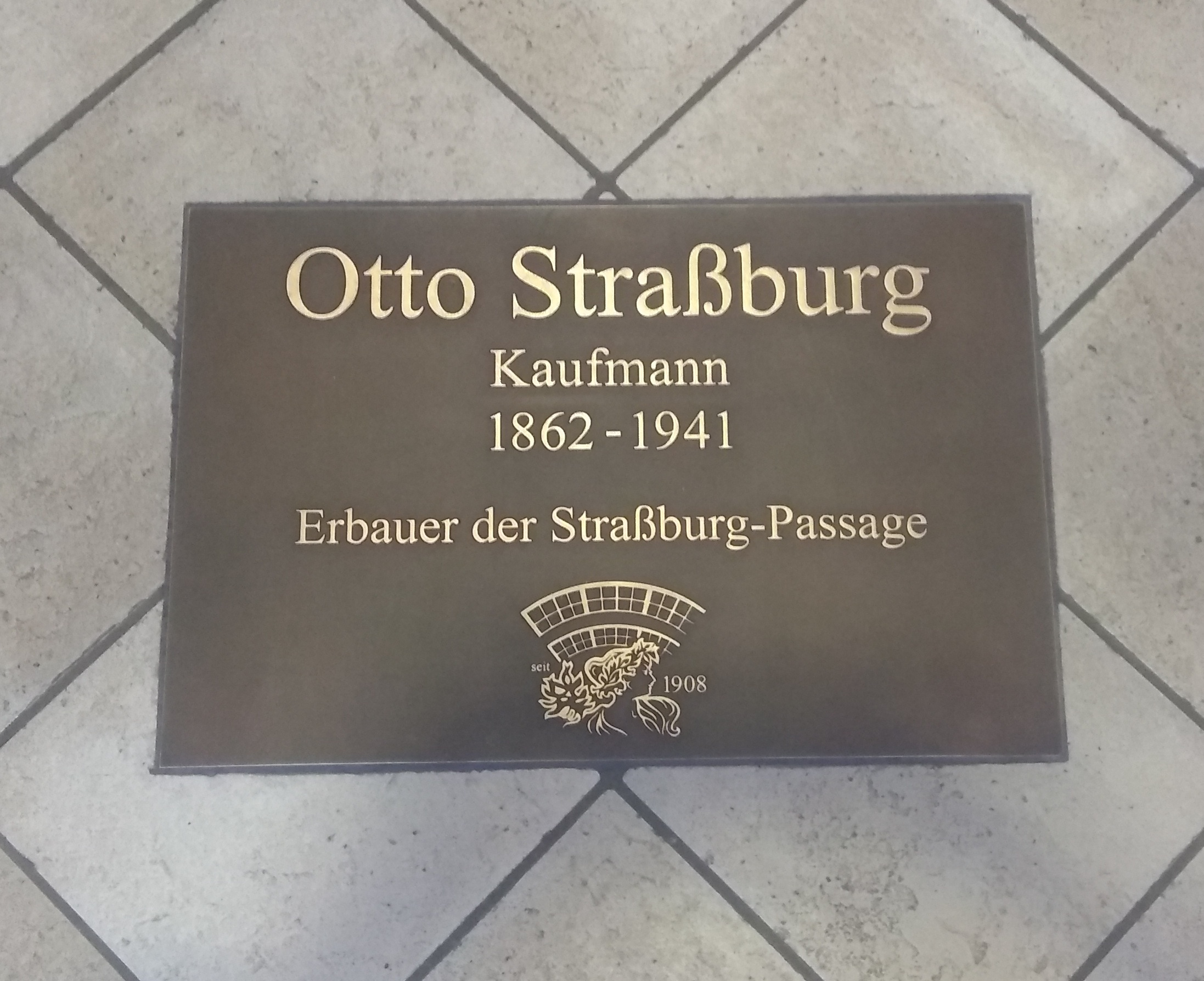 Gedenktafel für Otto Straßburg im Fußboden der Straßburg Passage (Görlitz) im Eingang von der Berliner Straße her